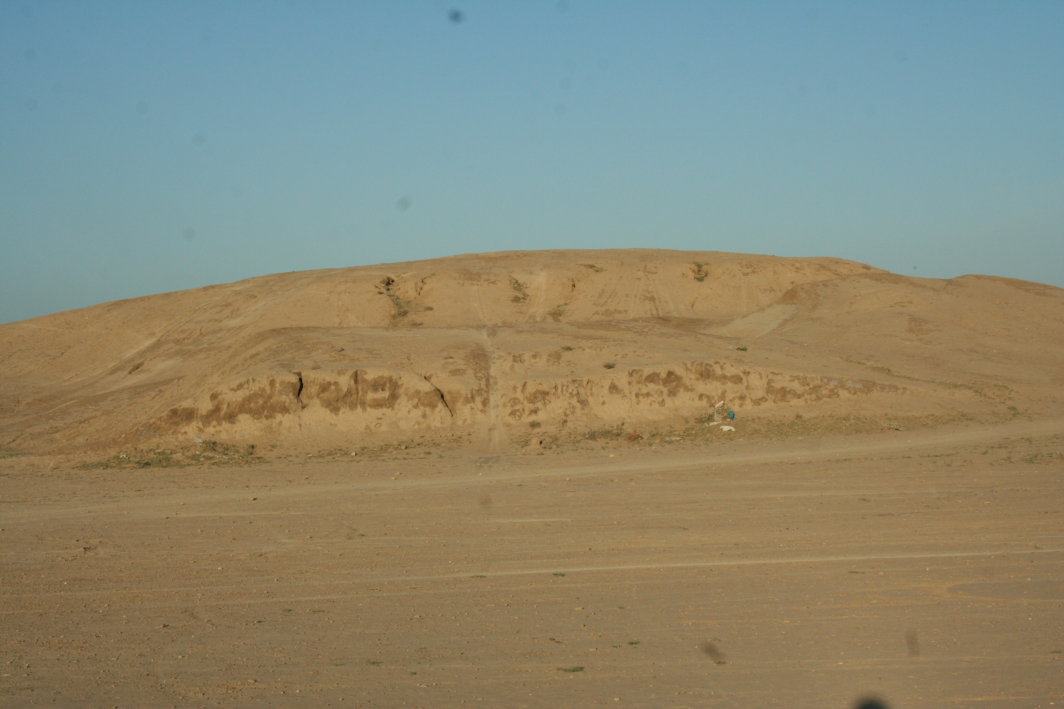 این تپه به ماقبل اسلام تعلق دارد و در فهرست آثار ملی ثبت شده است